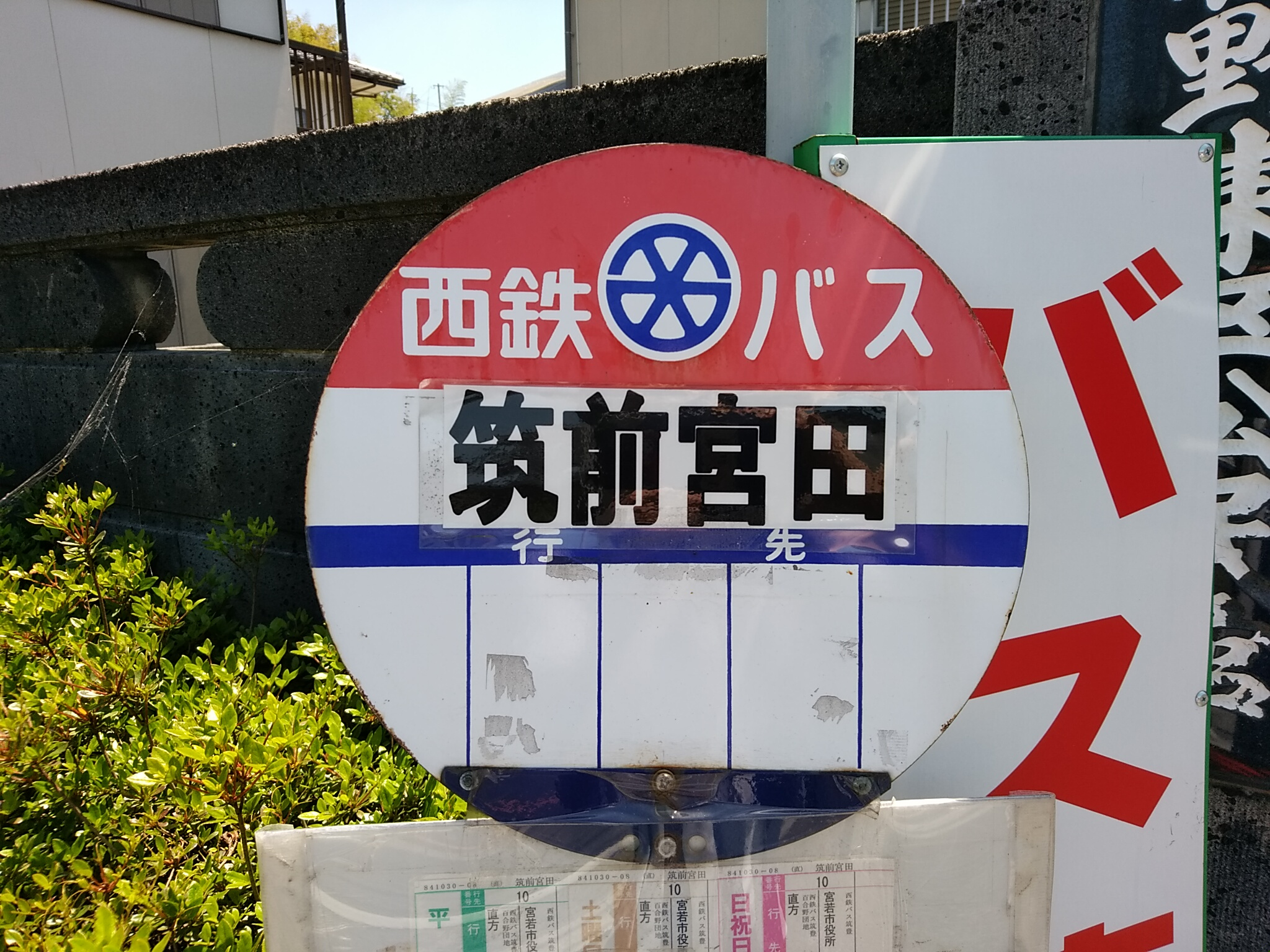 筑前宮田バス停 旧社章入り 20年5月上旬撮影